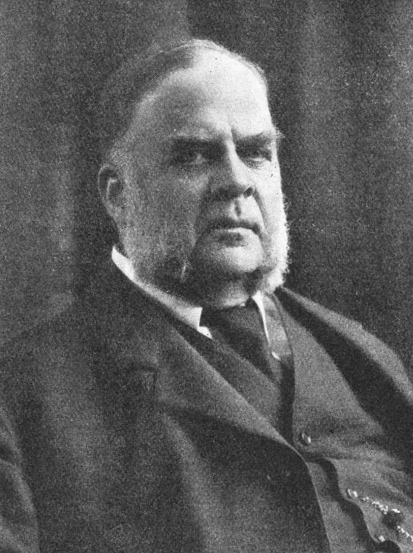 Otto Höglund (1846-1933) på omslaget av Hvar 8 Dag 1911.